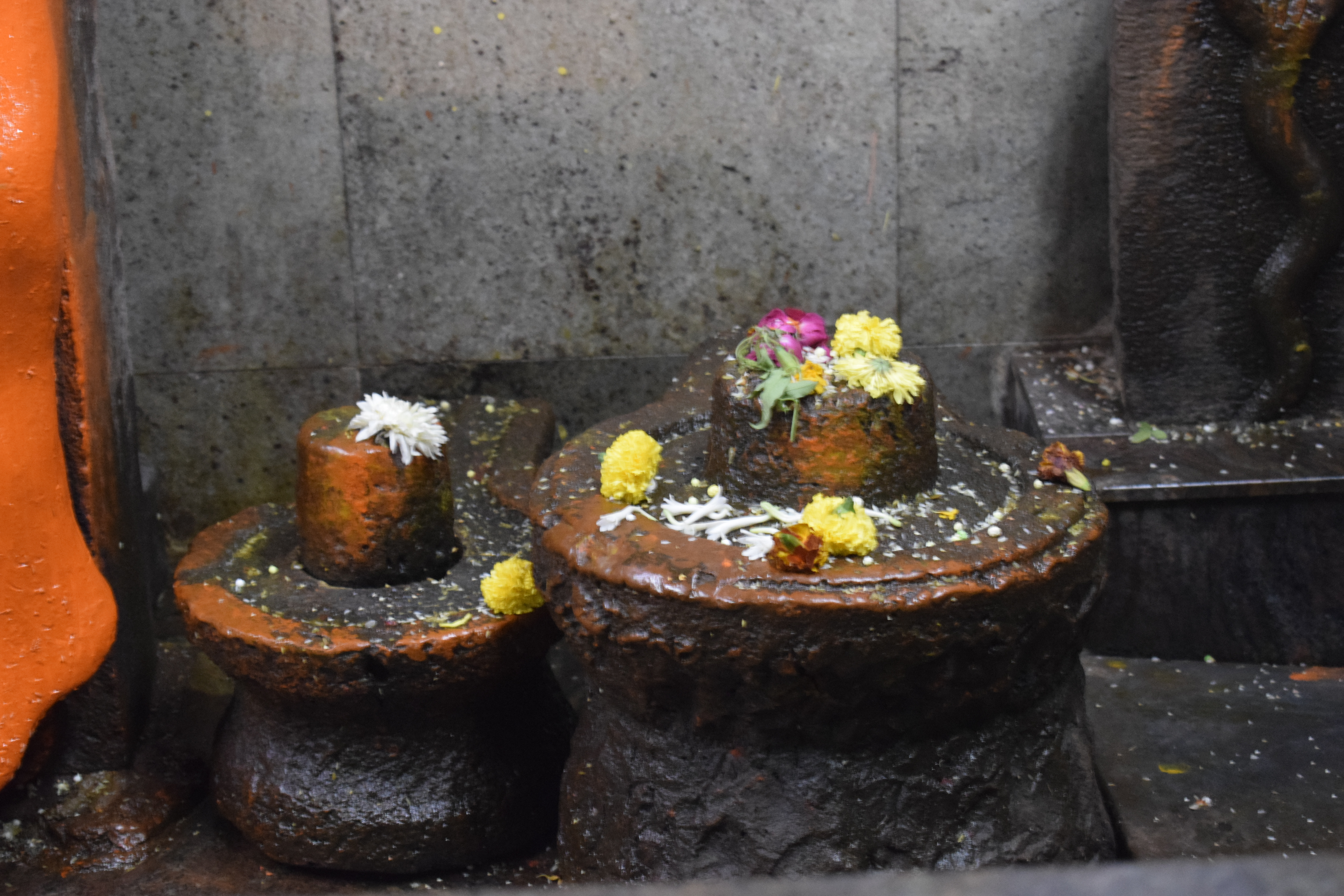 श्री सोमेश्वर लिंग